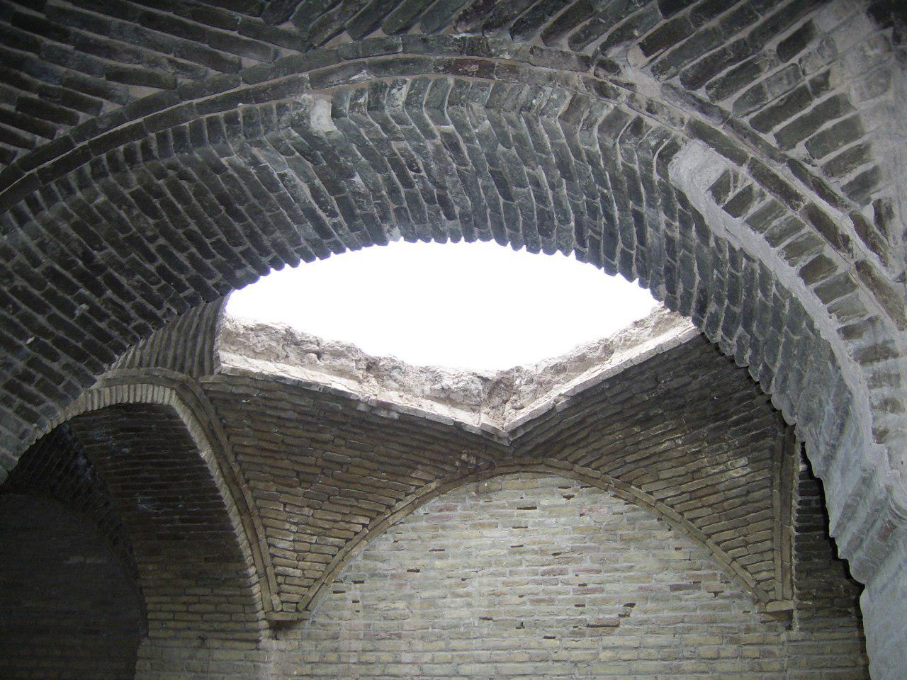 بارانداز قدیمی قوش خزائی